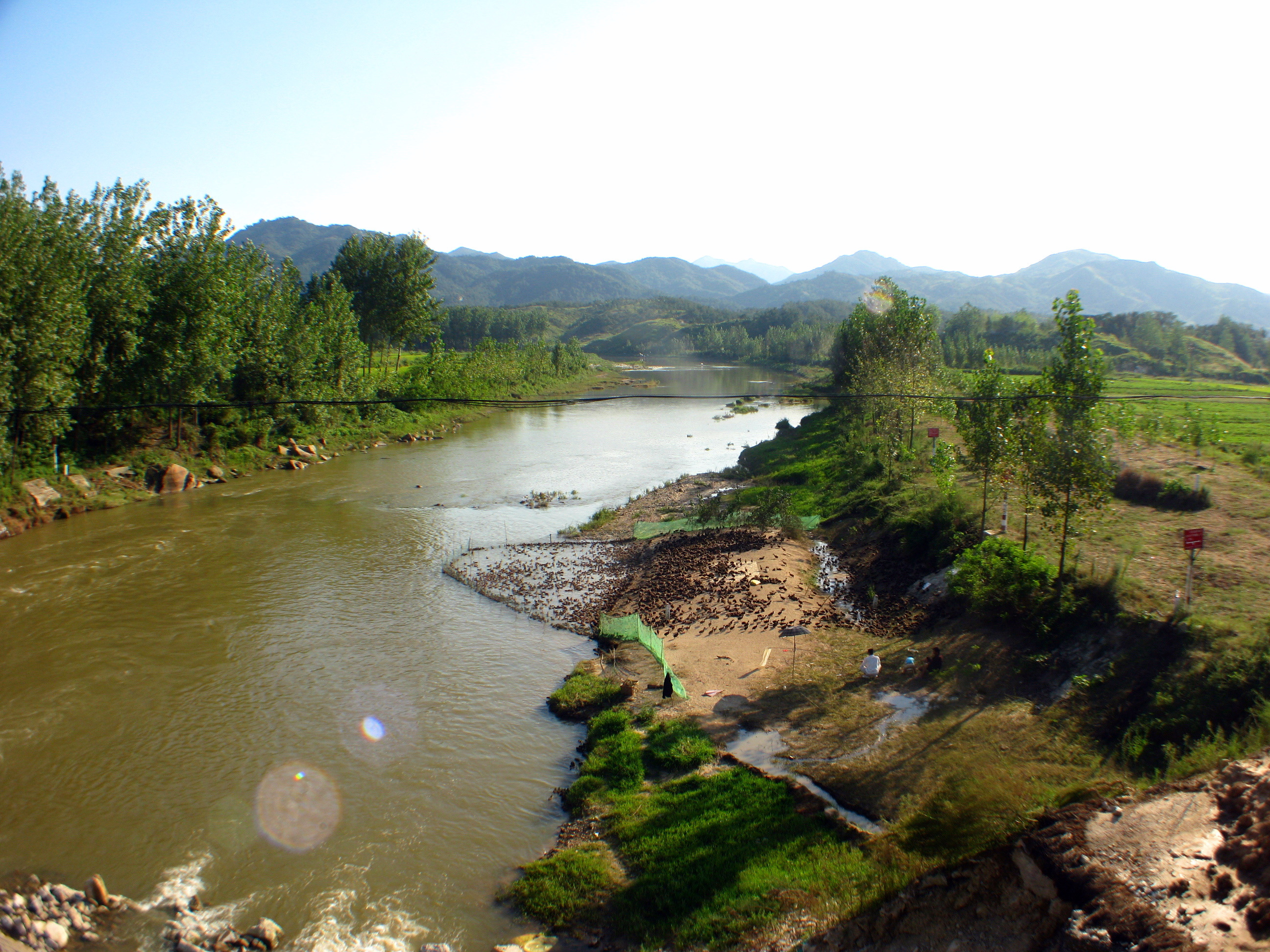 唐河县乡村景观